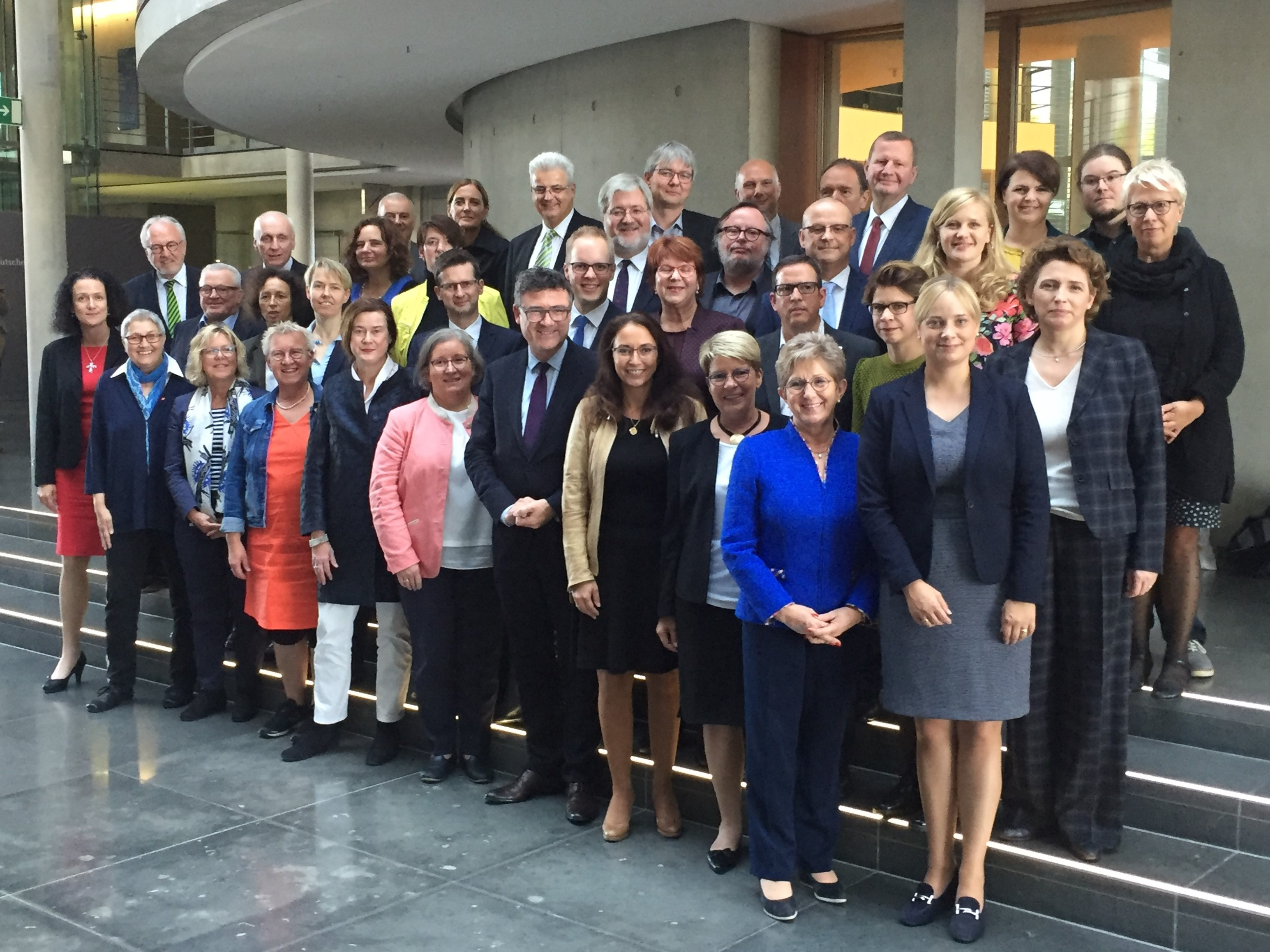 Die Enquete-Kommission „Berufliche Bildung in der digitalen Arbeitswelt“ des Deutschen Bundestags unter Vorsitz von Dr. Stefan Kaufmann (CDU) hat den Auftrag, die Entwicklungsperspektiven der beruflichen Aus- und Weiterbildung in der künftigen, digitalisierten Arbeitswelt zu untersuchen und die ökonomischen und sozialen Potentiale einer Modernisierung zu prüfen. Die Einsetzung der Kommission wurde vom Deutschen Bundestag auf gemeinsamen Antrag der Fraktionen von CDU/CSU, SPD, FDP und Die Linke, bei Enthaltung von Bündnis 90/Die Grünen am 28. Juni 2018 beschlossen. Die konstituierende Sitzung der Enquete-Kommission fand am 27. September 2018 statt.